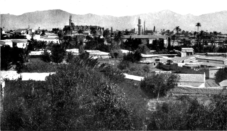 Nicosia, Cyprus